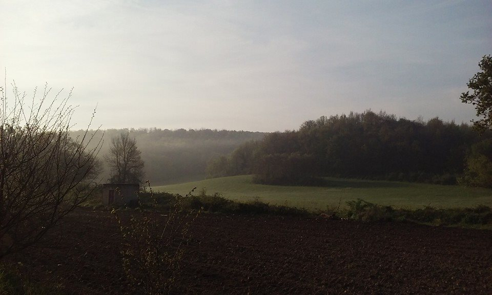 questi sono i boschi situati nel Parco dell'Inviolata